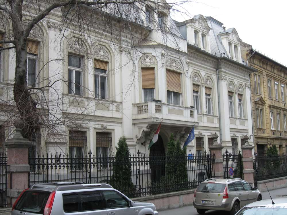 Szabad Demokraták Szövetségének székháza 1990-2010 között